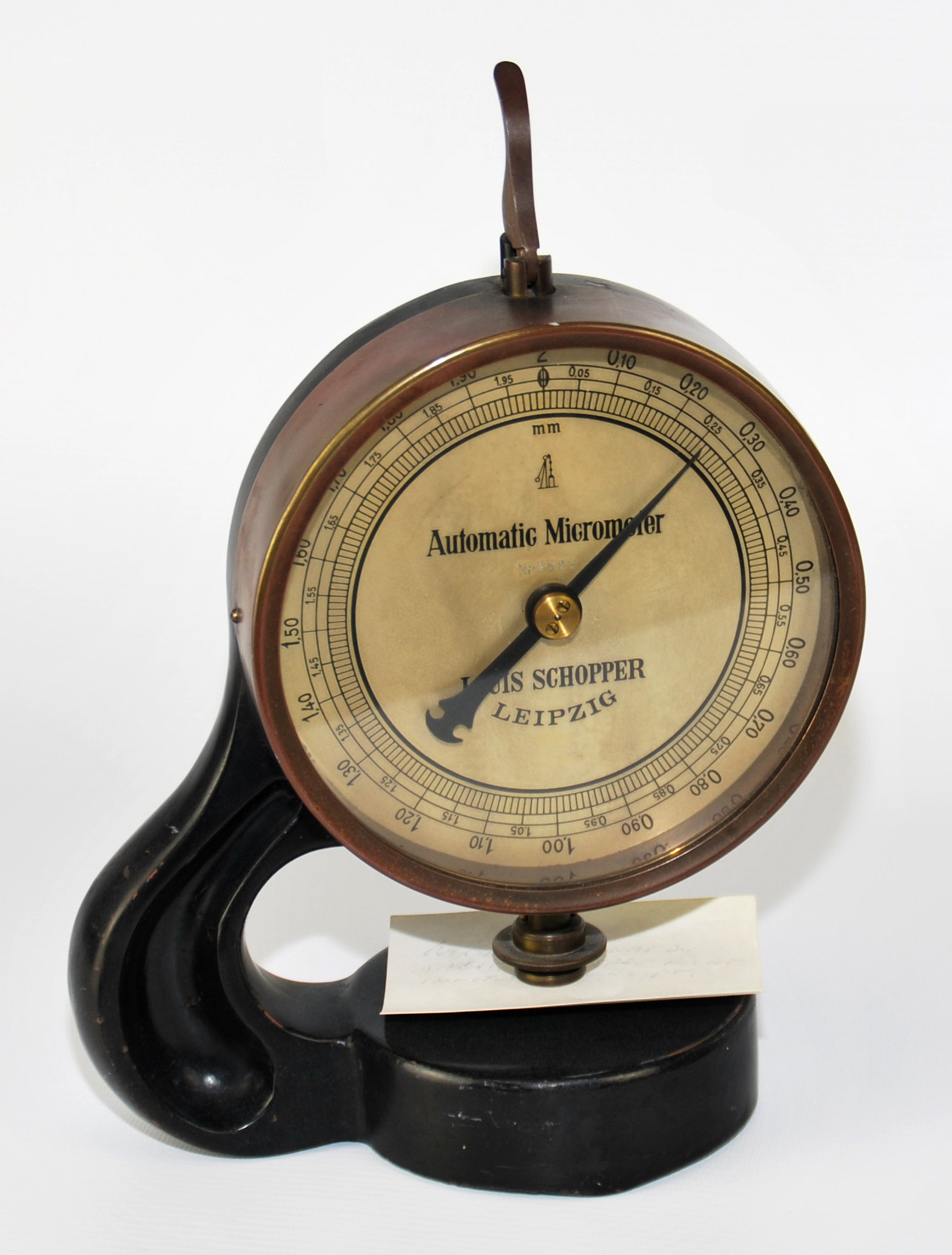 Automatisches Mikrometer von Louis Schopper aus dem Bestand der Firma Hildebrandt